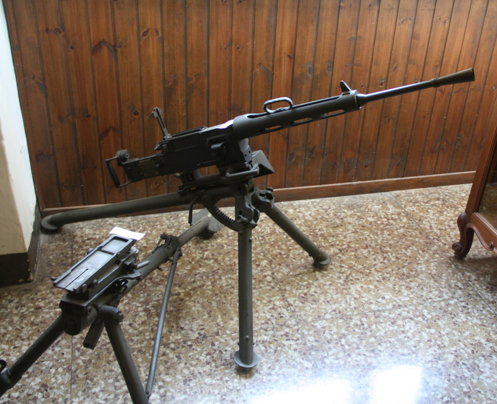 Fiat-Revelli Mod. 35 machine gun.